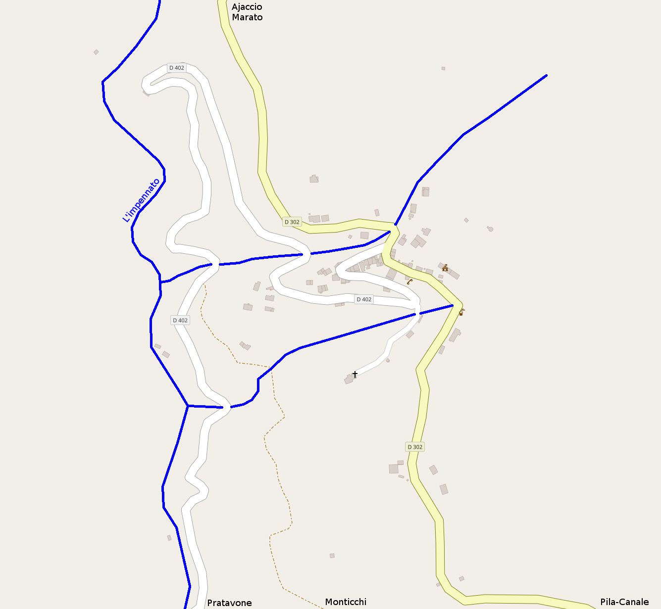 Carte du centre-bourg de Cognocoli. L'édification sur un éperon rocheux - entre deux ruisseaux affluents de l'Impennato - en hautes maisons alignées accentue la vocation défensive de l'architecture du village.